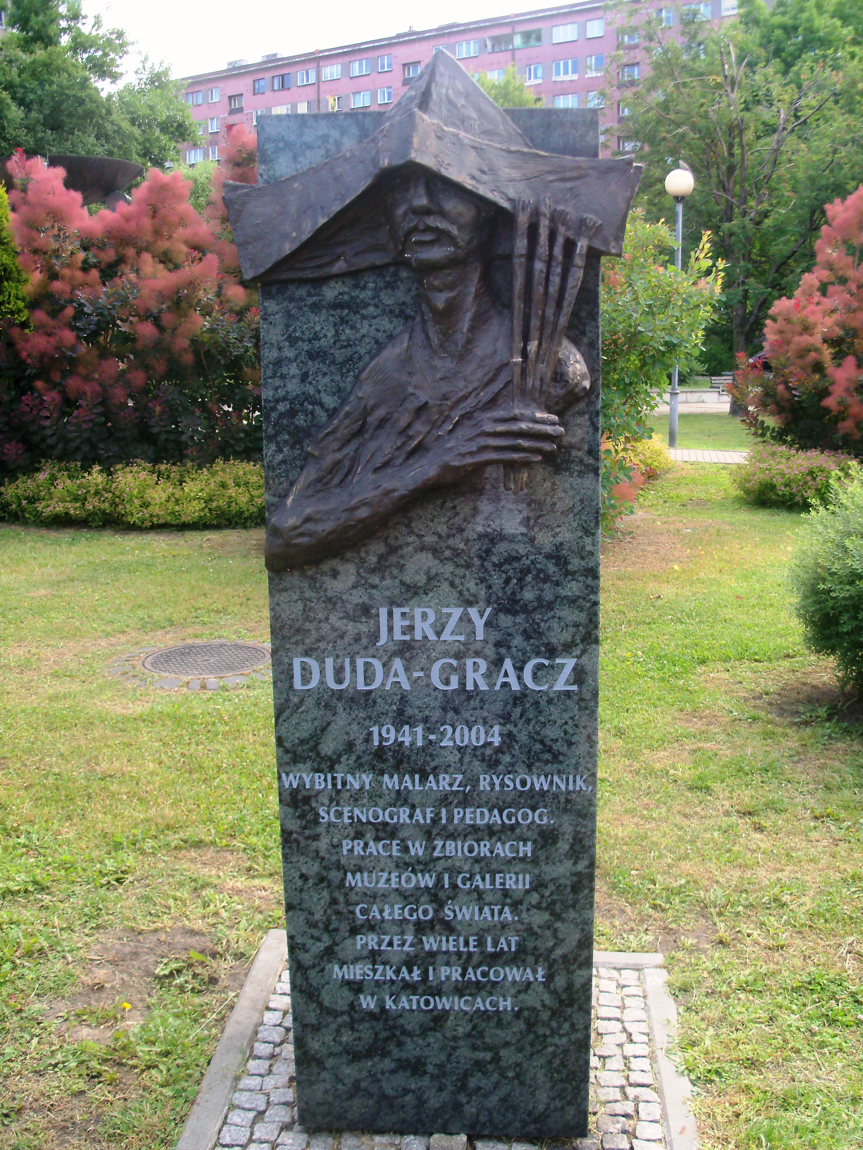 Galeria Artystyczna na placu Grunwaldzkim w Katowicach: Rzeźba przedstawiająca Jerzego Dudę-Gracza